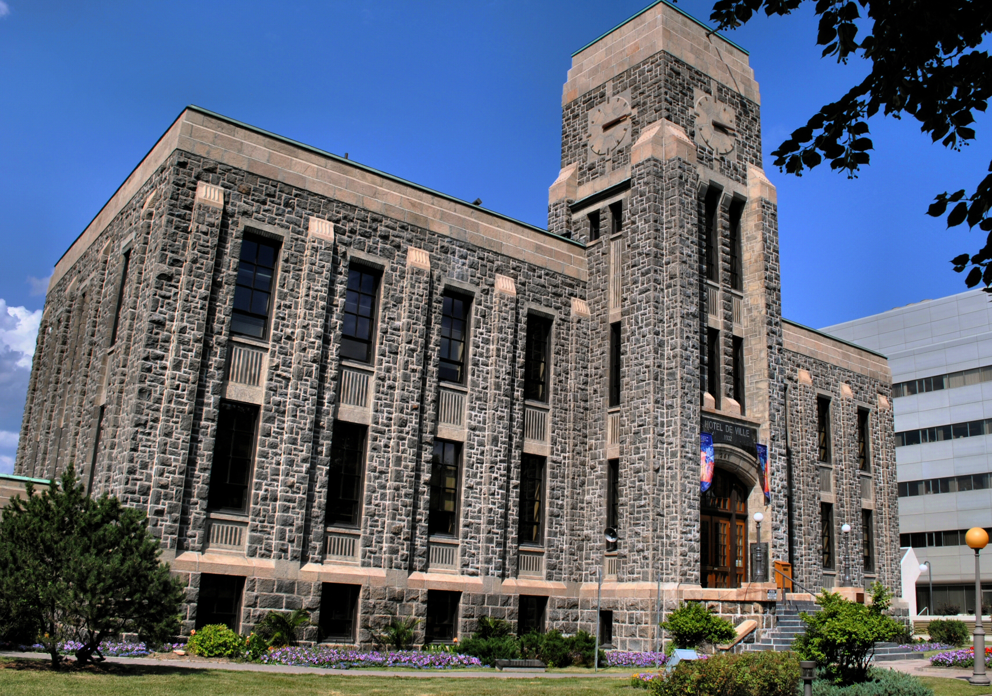 Hôtel de ville de Saguenay